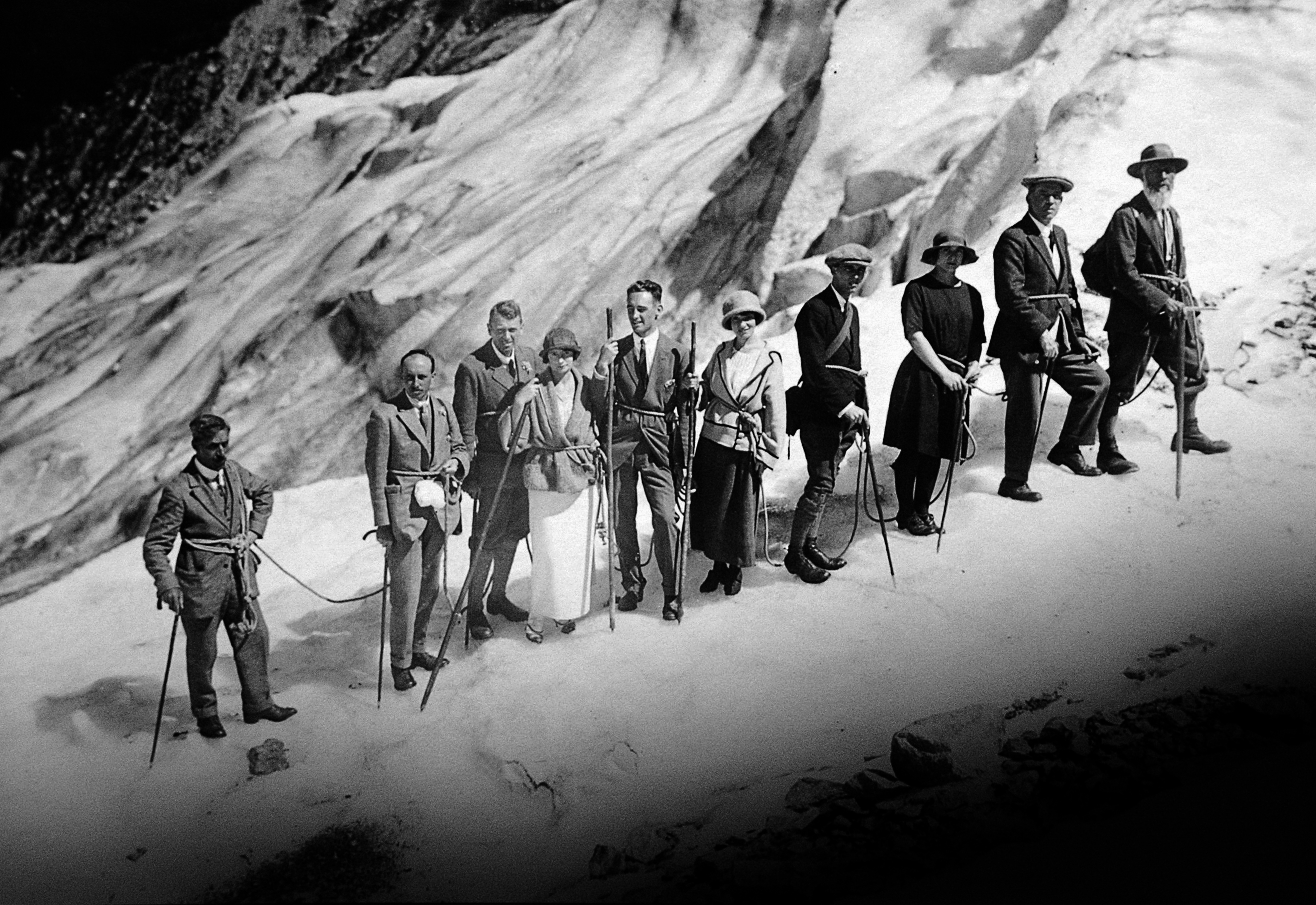 Peter Kaufmann führt eine Gruppe auf dem Grindelwaldgletscher BE um 1920